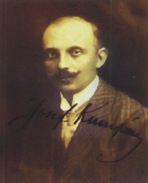 Josef Kumpán (1885-1961), český krajinářský a zahradní architekt